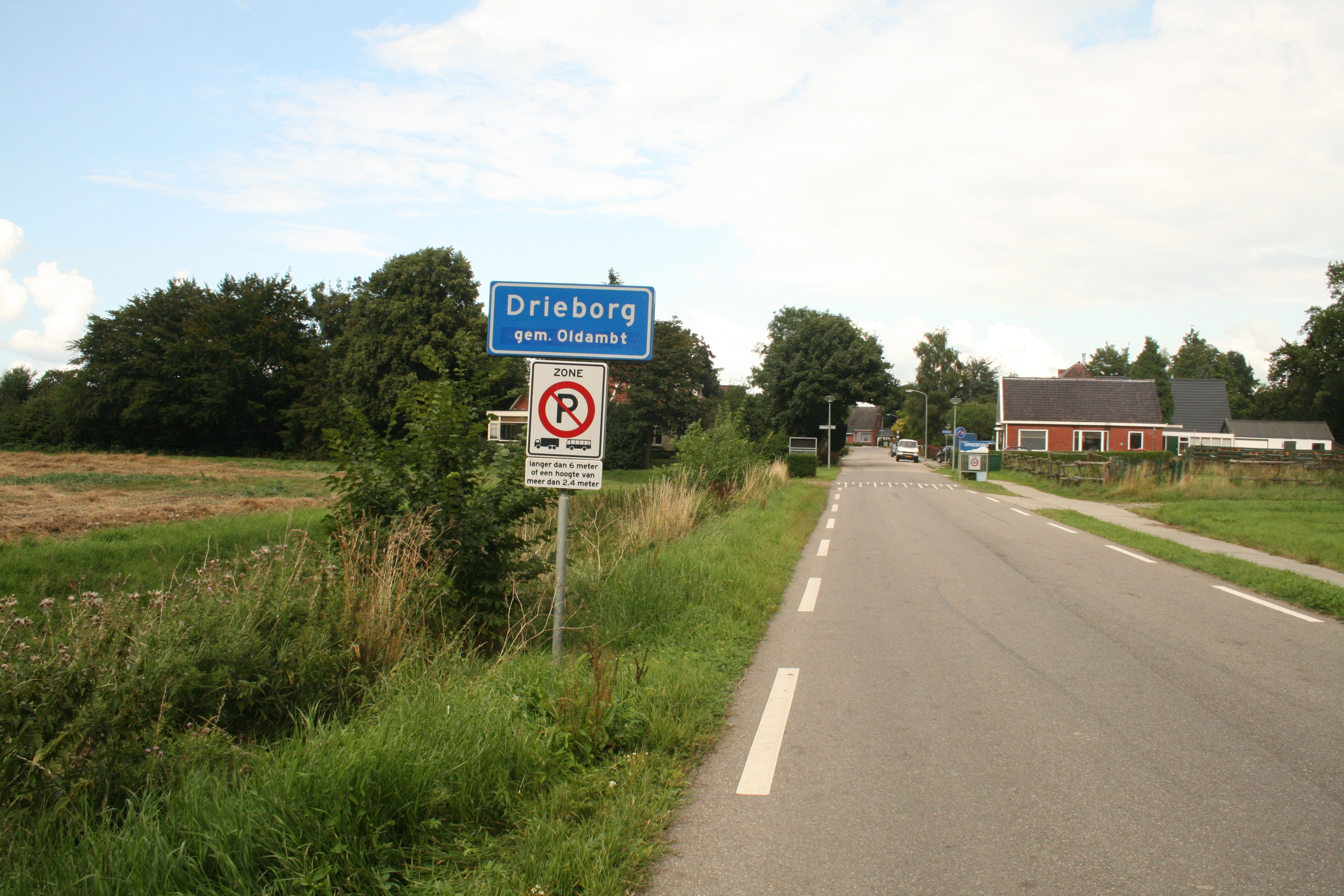 Drieborg 1 Begin bebouwde kom (2010)